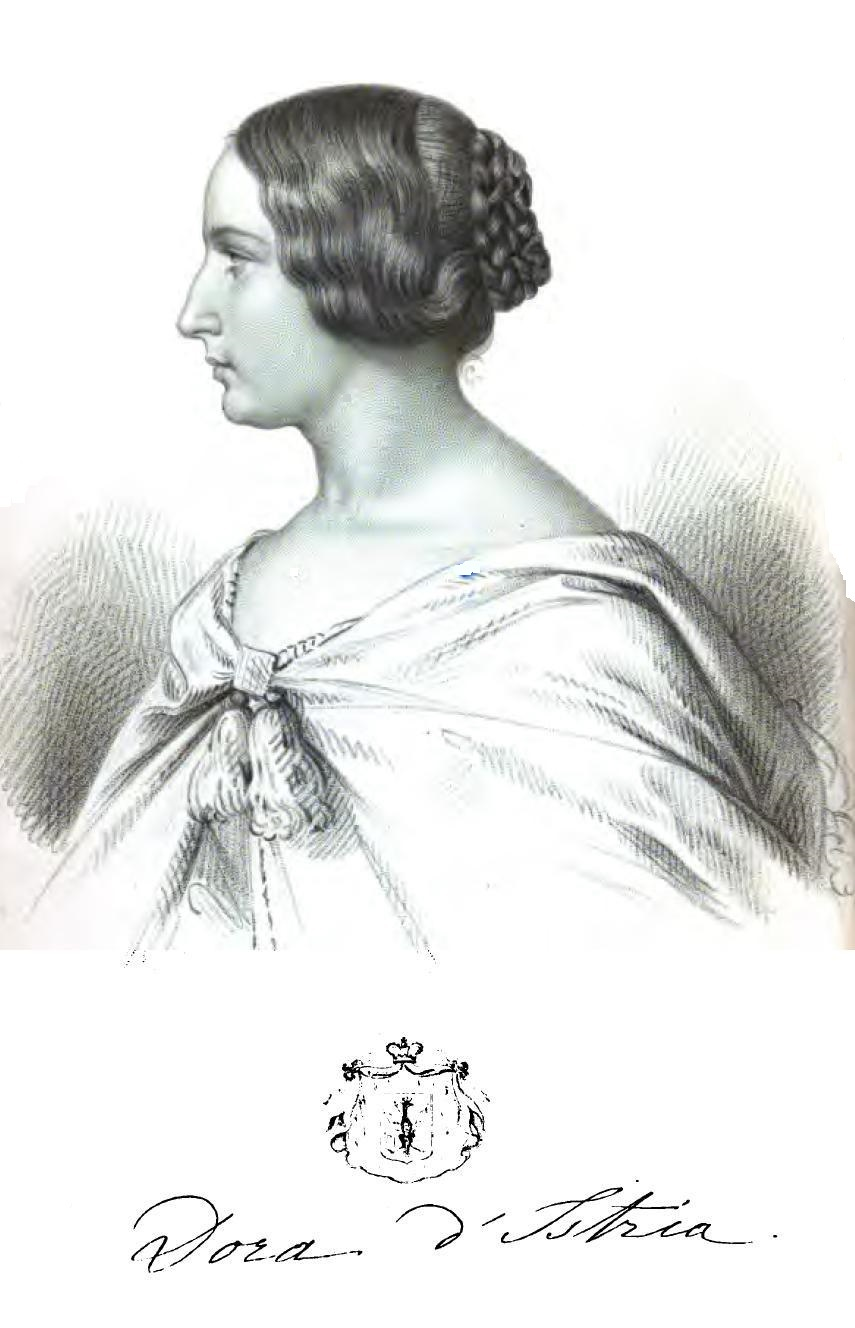 source: [1]